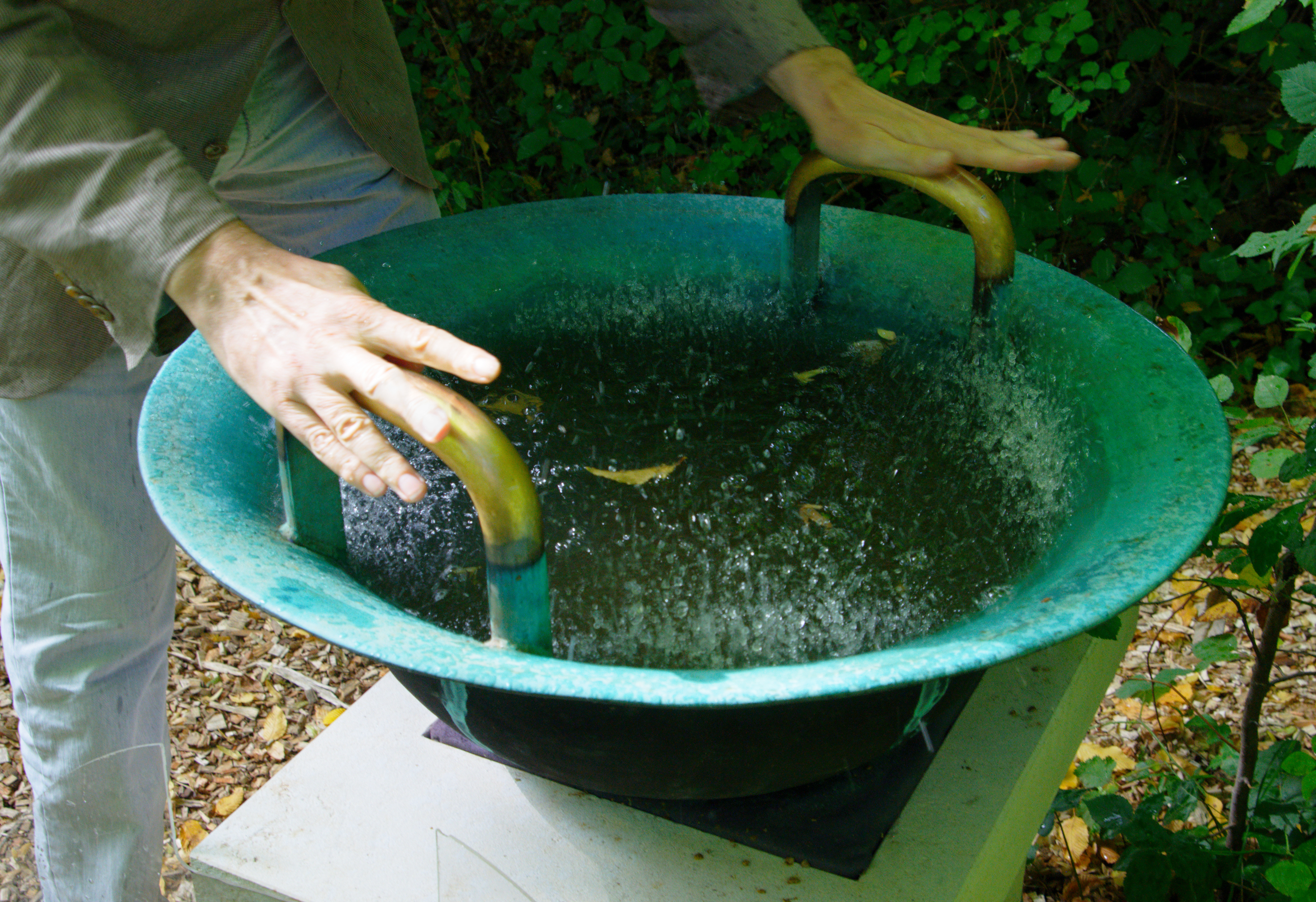 Wasser-Klangschale in einem Garten der Darmstädter Künstlerkolonie. Die Schale wird durch Reiben der beiden Metallbügel in Schwingung versetzt. Durch die Vibration der Schale gerät auch das Wasser in Schwingung und spritzt schließlich auf.